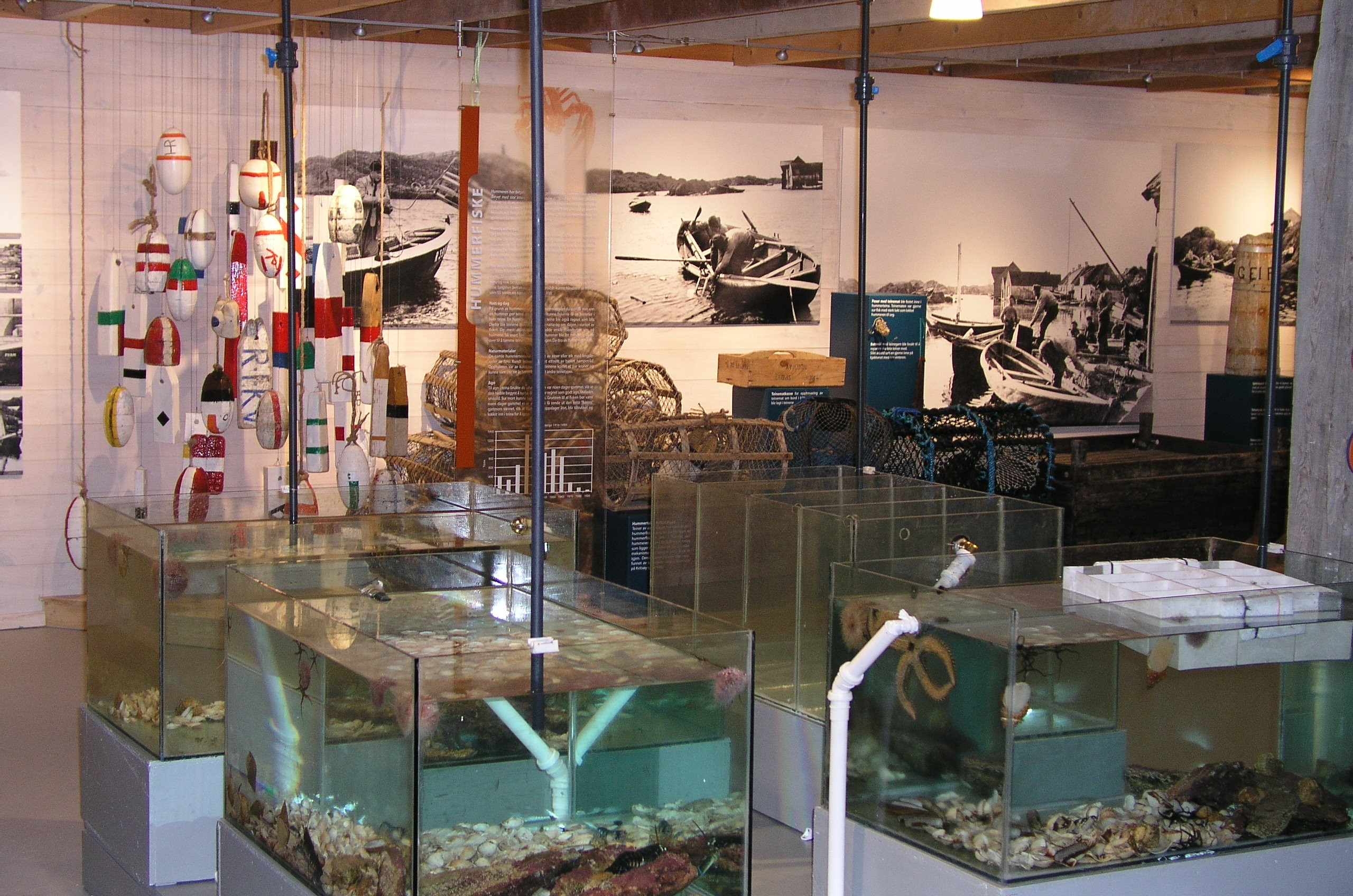 Norsk (nynorsk): Kvitsøy hummermuseum er ei avdeling av Ryfylkemuseet